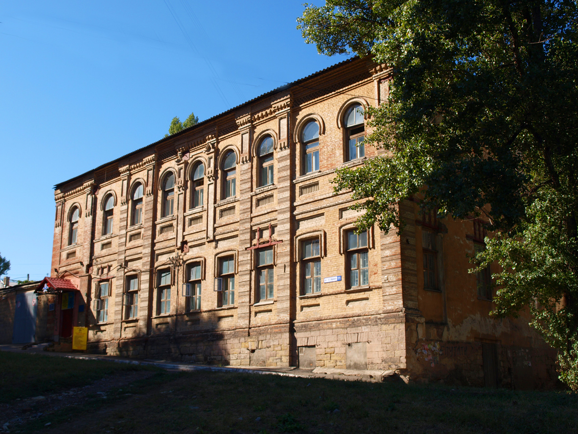 Луганськ. Колишній хедер (єврейська школа)